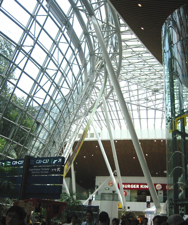 Kuala Lumpur International Airport (Malaysia) — Satellite Terminal